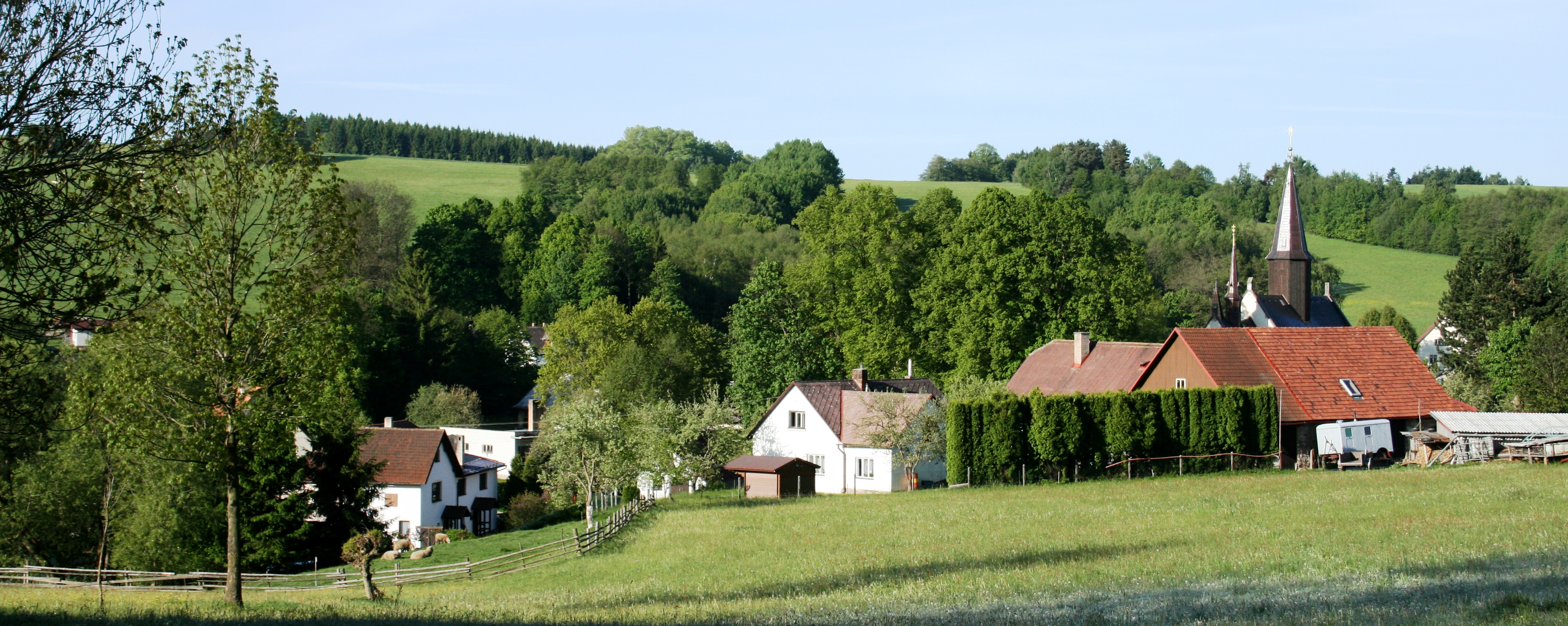 Pohled na Korouhev